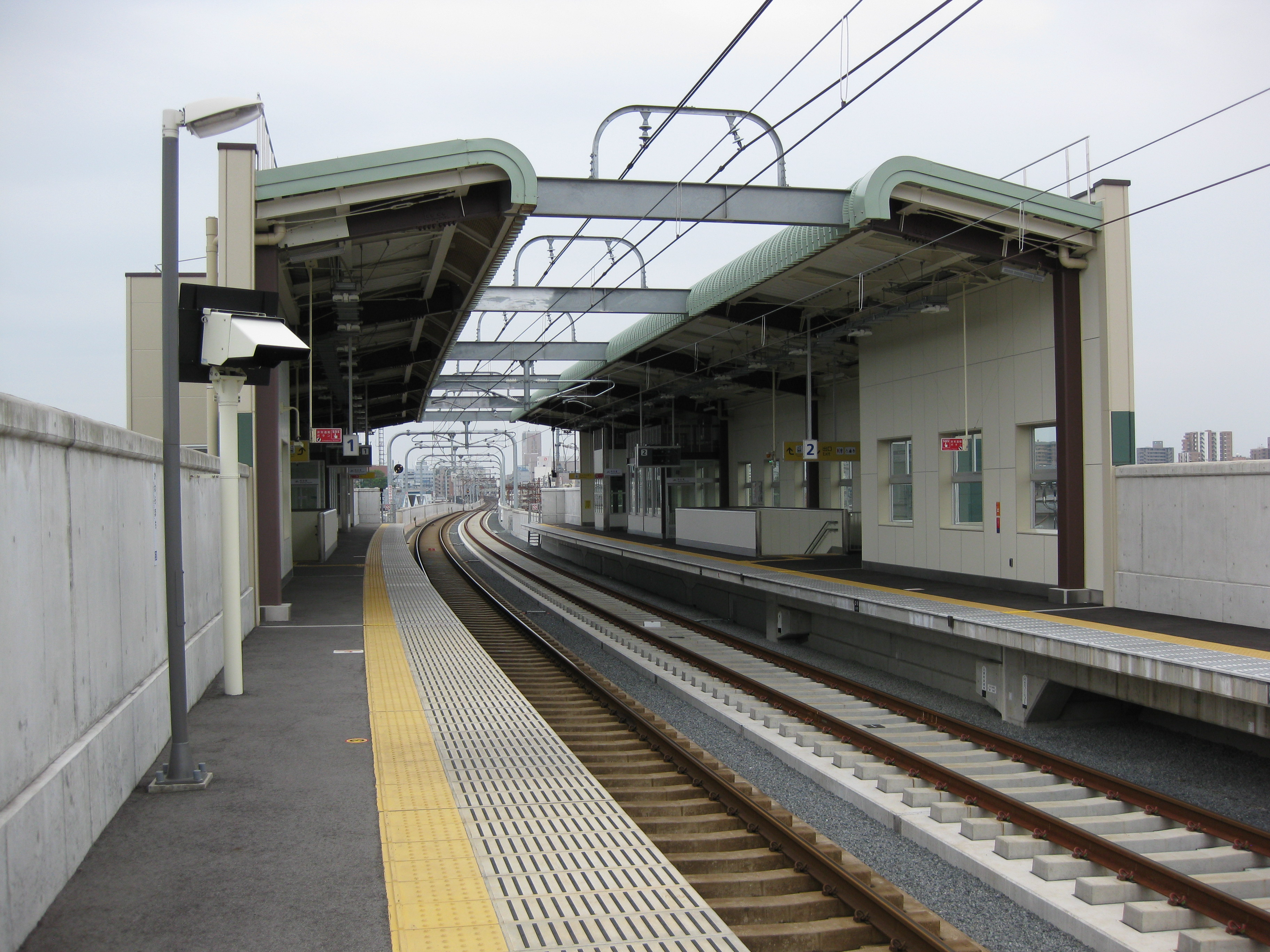 高架化後のja:川原町駅プラットホーム